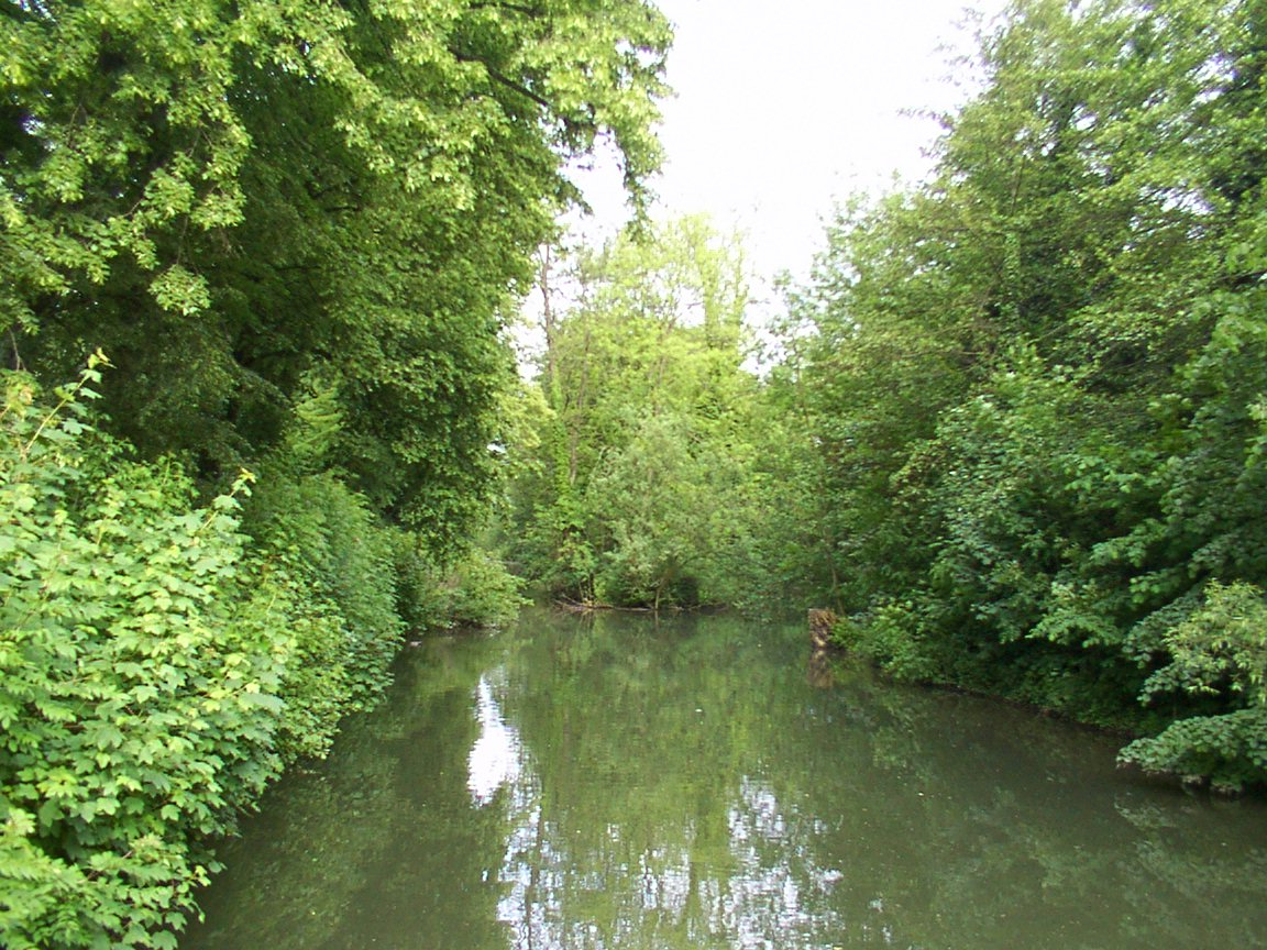 Die Bega in Lemgo am Lindenwall